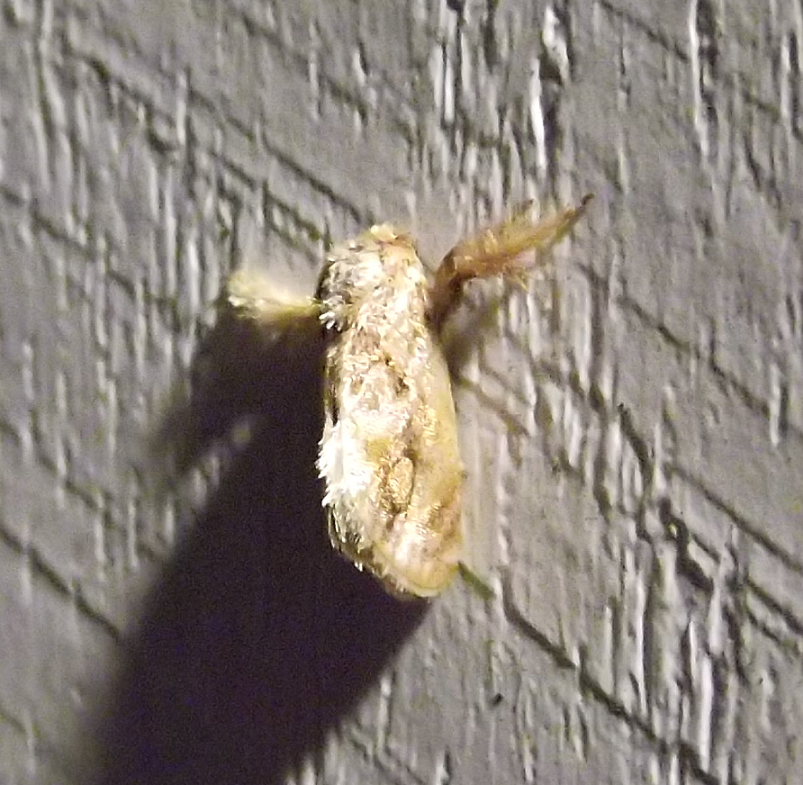 Spun Glass Slug Moth (Isochaetes beutenmuelleri).